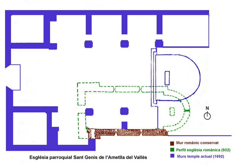 Planta de l'església de Sant Genís (l'Ametlla del Vallès-Catalunya); Layout from church of Sant Genís (l'Ametlla del Vallès-Catalonia)